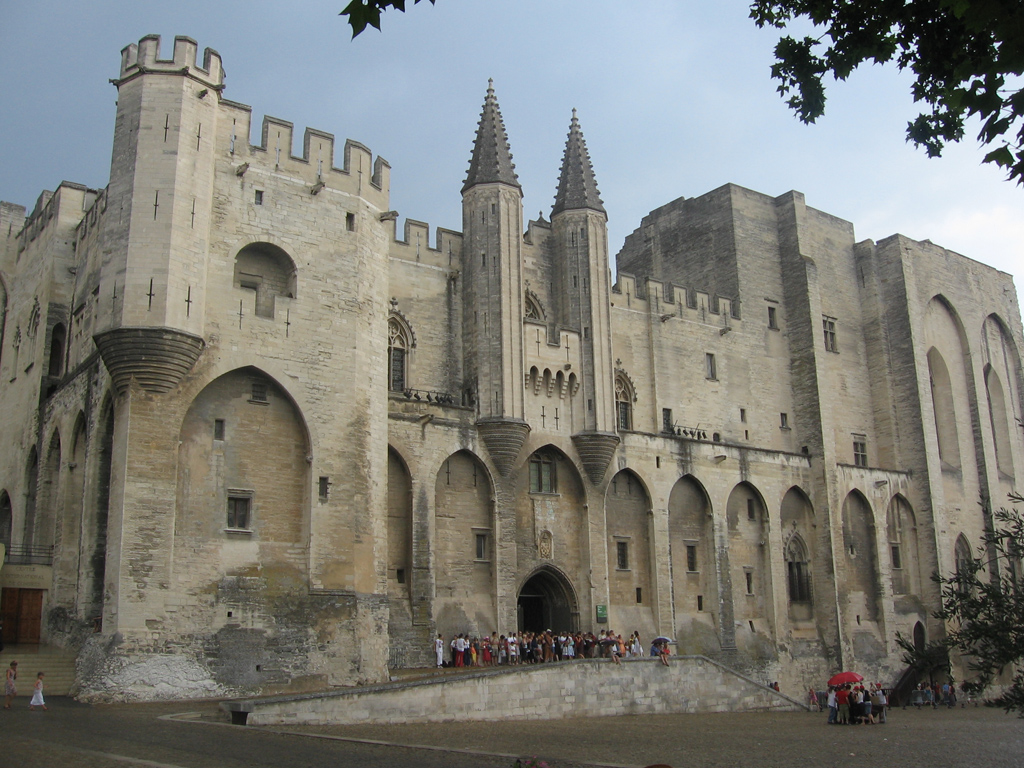 Palais des Papes